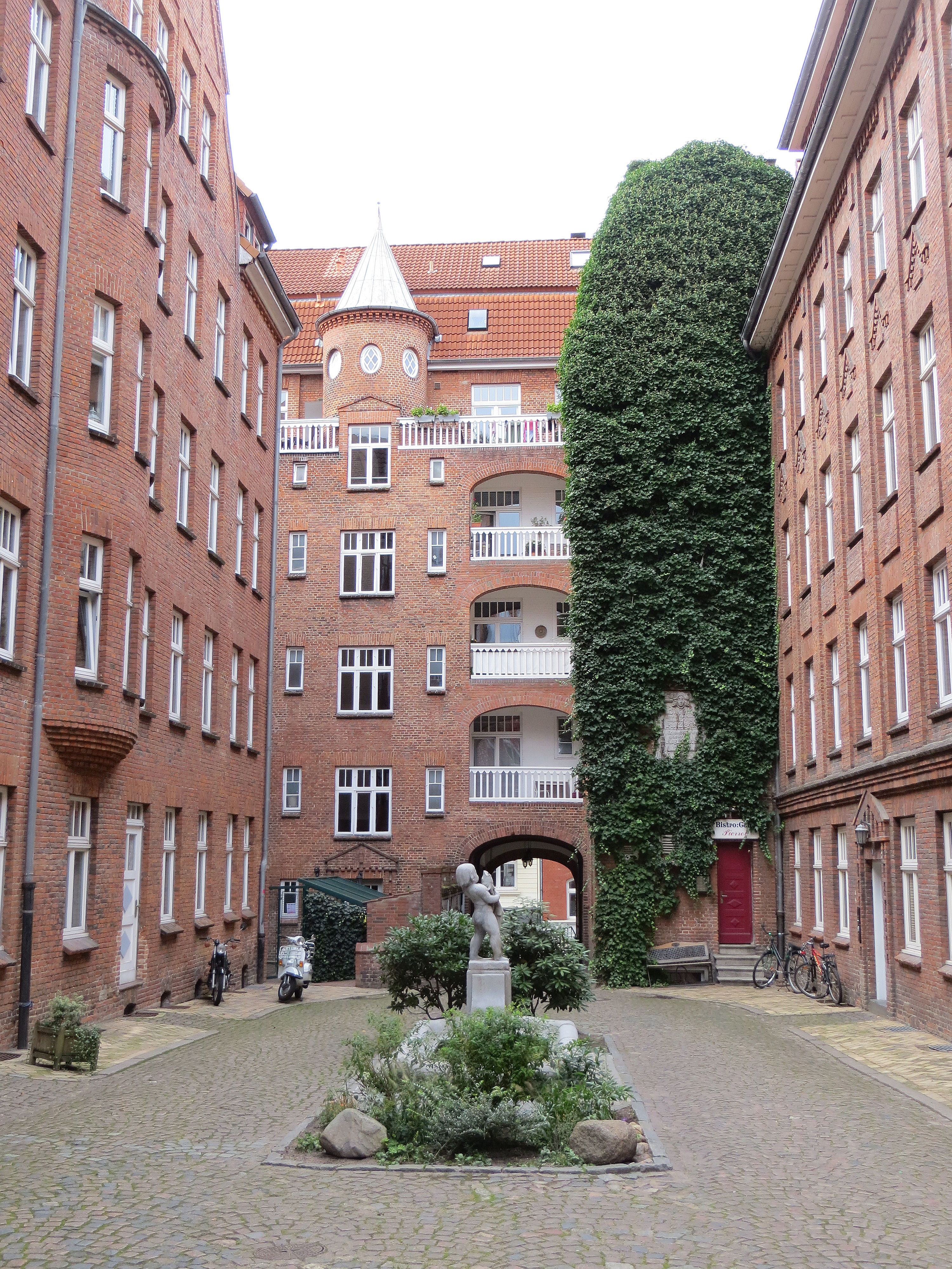 Burghof, Flensburg, Blick nach Norden